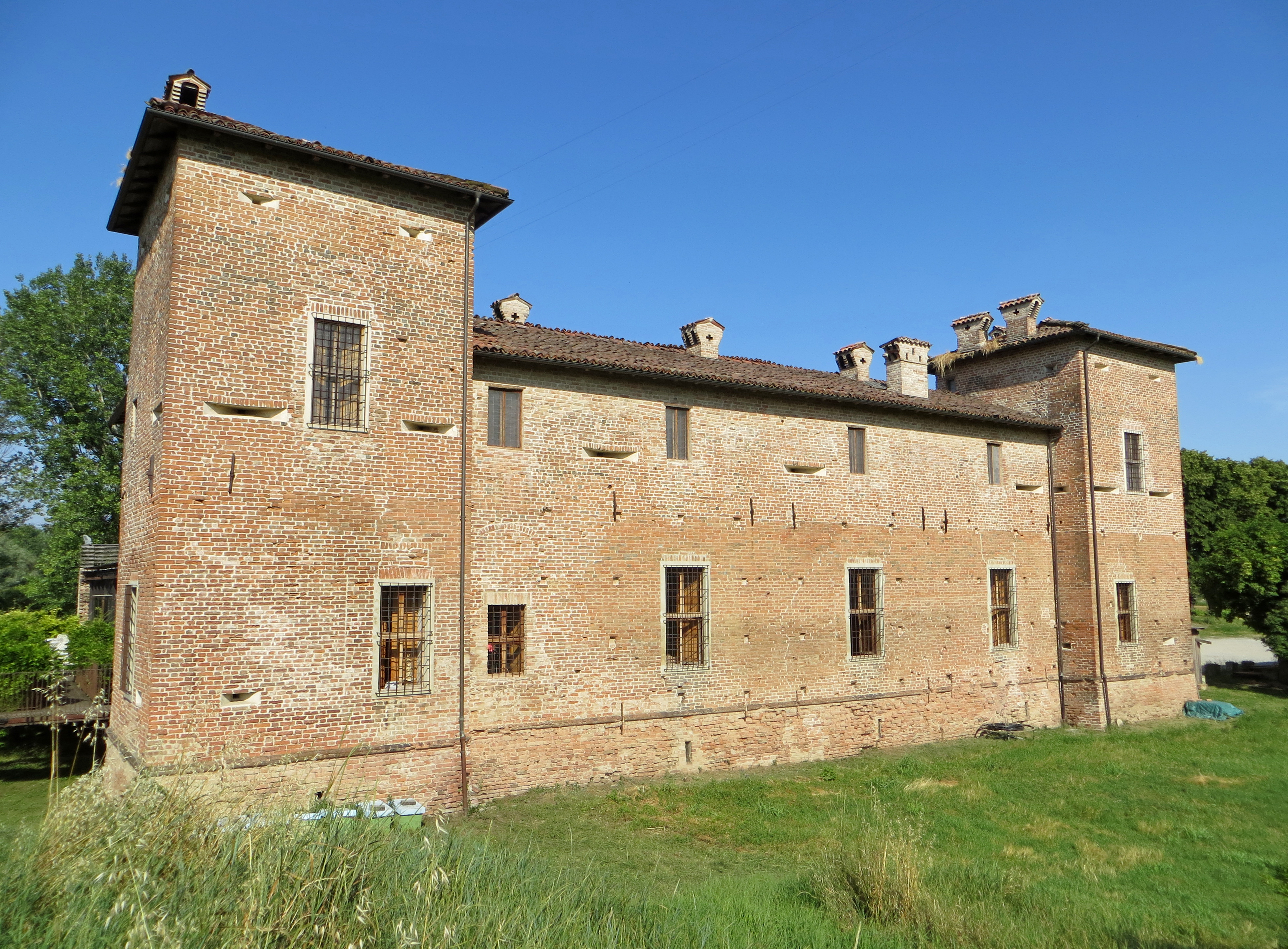 Antica Corte Pallavicina (Polesine Parmense) - facciata posteriore